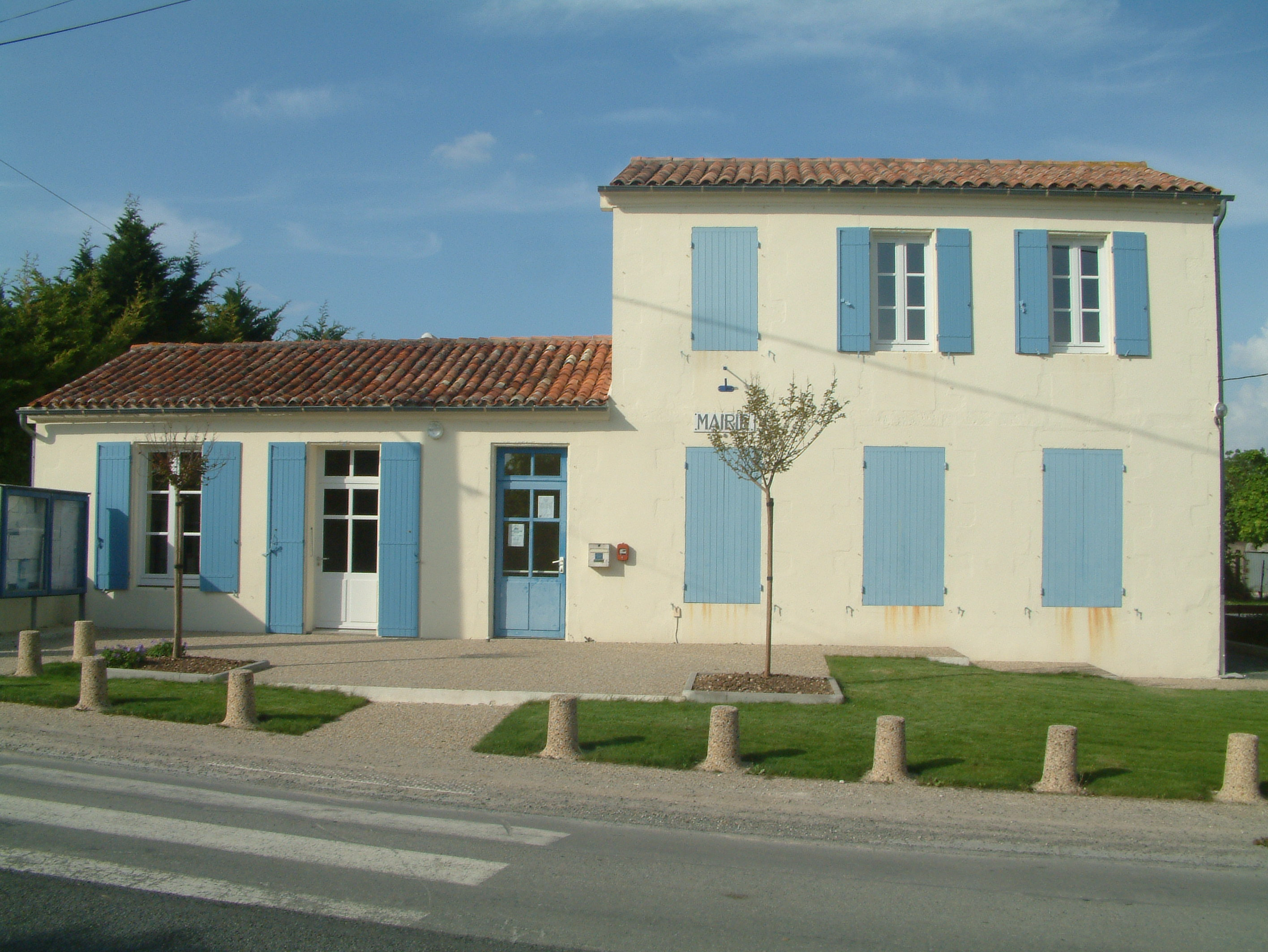 Mairie de St Coutant le Grand